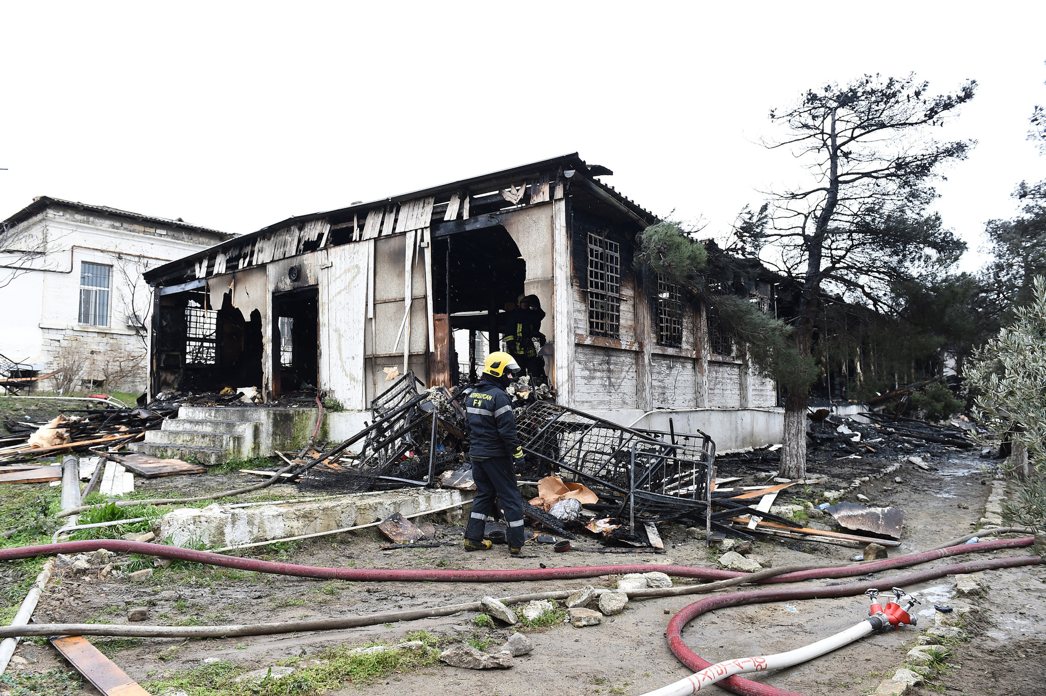 İlham Əliyev yanğın baş verən Respublika Narkoloji Mərkəzinə gələrək vəziyyətlə tanış olub